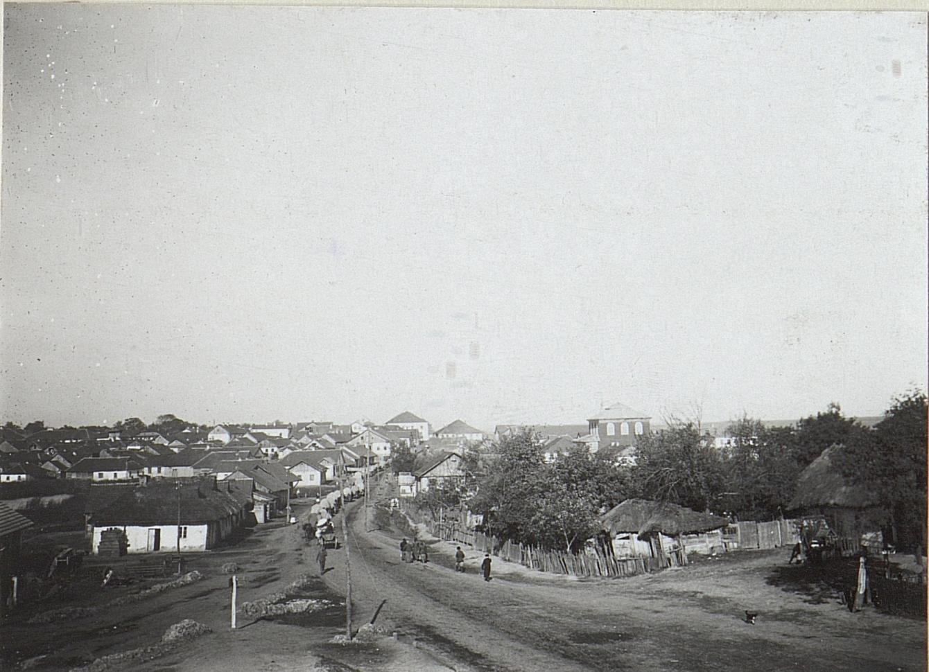 Gorochow